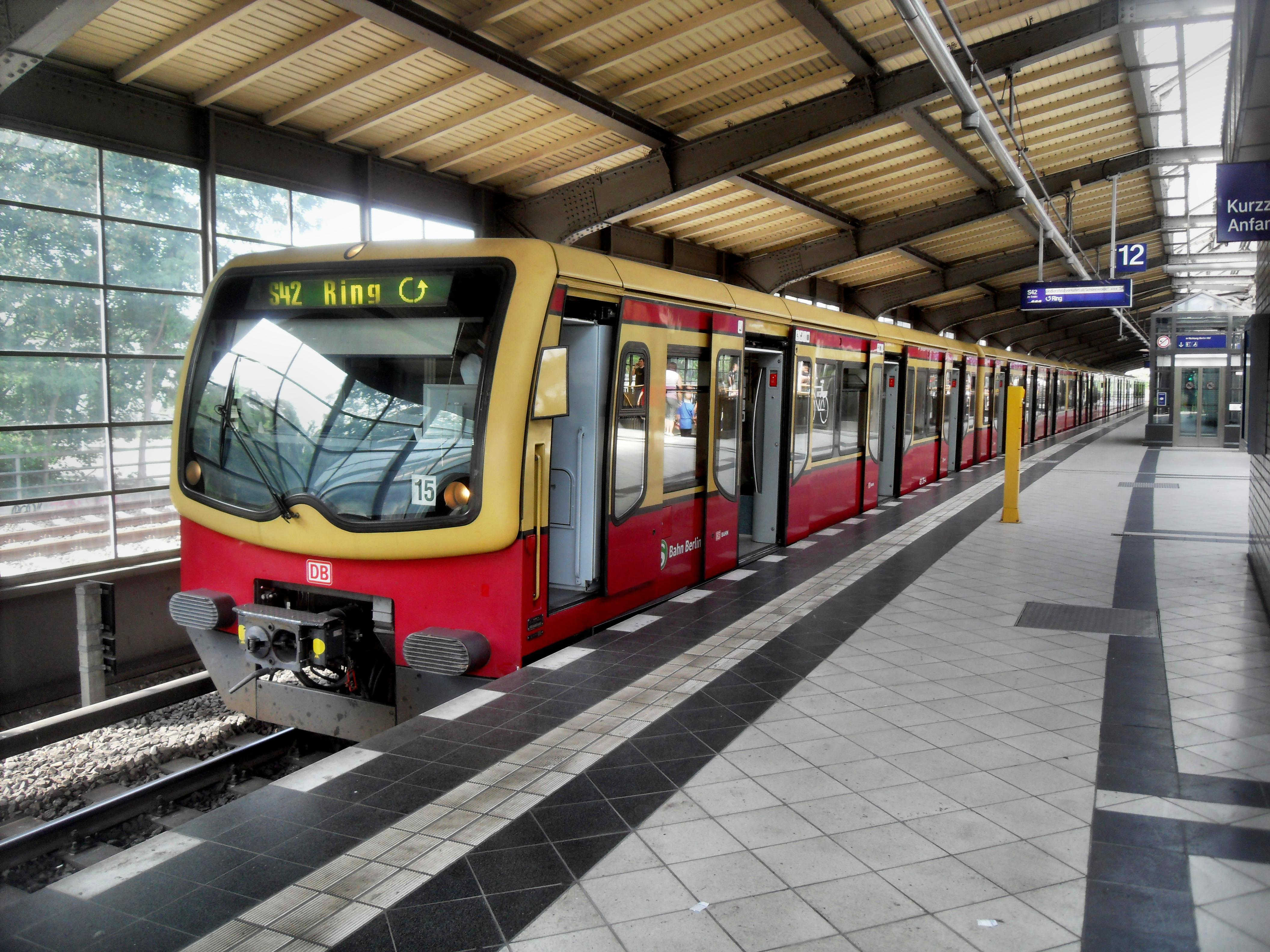 Triebwagen der DBAG-Baureihe 481 der S-Bahn Berlin auf der Linie S 42 (Ringbahn, gegen den Uhrzeigersinn) im Bahnhof Westkreuz in Deutschland